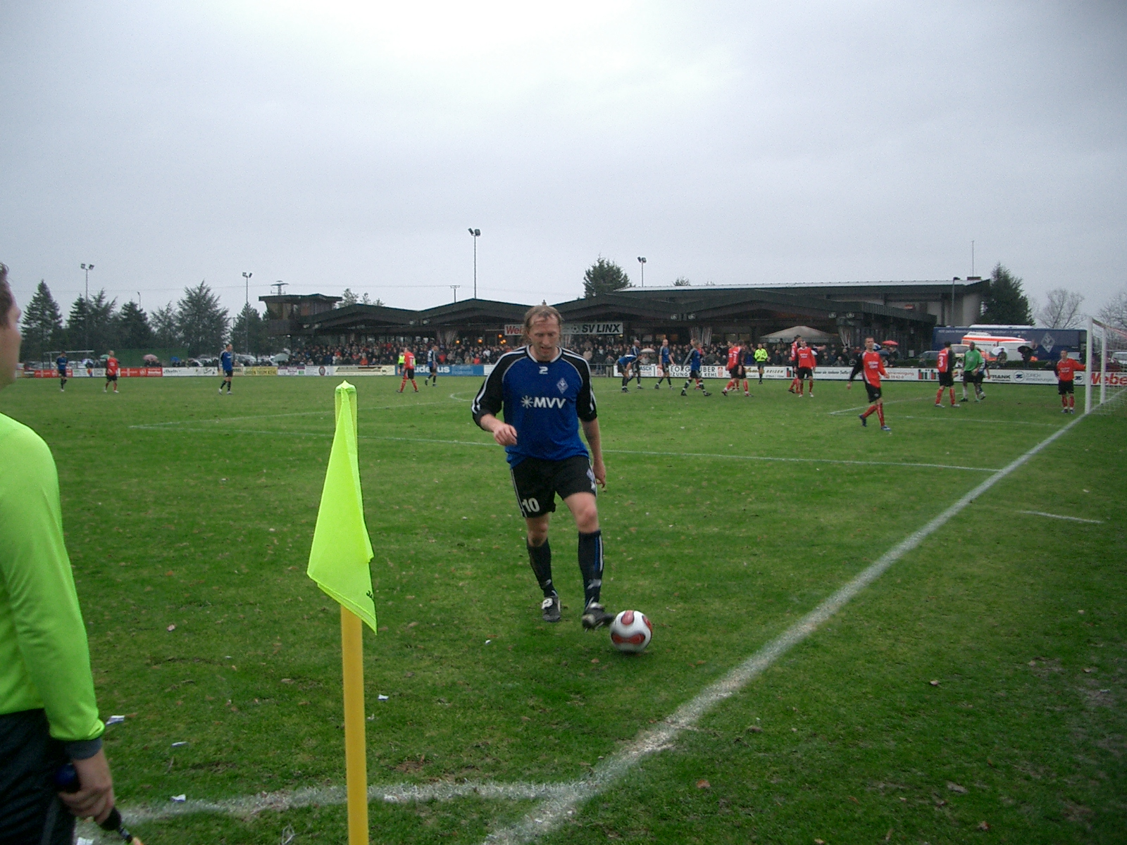 Spielszene SV Linx - SV Waldhof Hans Weber Stadion (Thomas Ollhoff mit der Nummer 10)